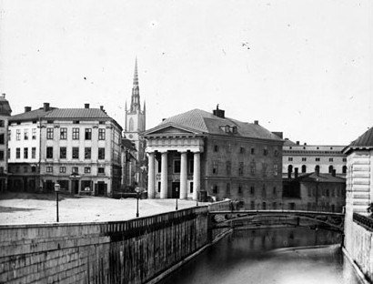 Mynttorget i Gamla stan. I bakgrunden Riddarholmskyrkan. Fotografi av Eugène Trutat från 1860-talet.